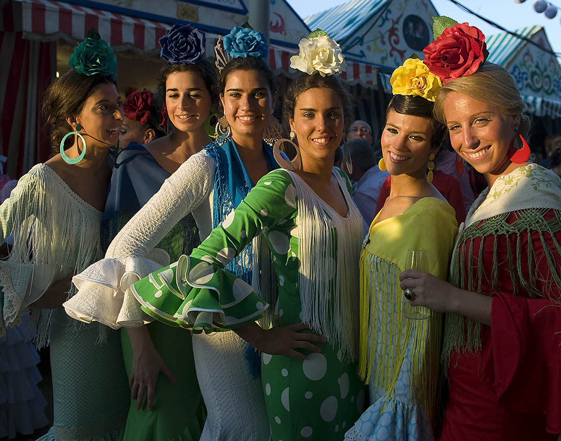 Feria de abril 2011, Sevilla